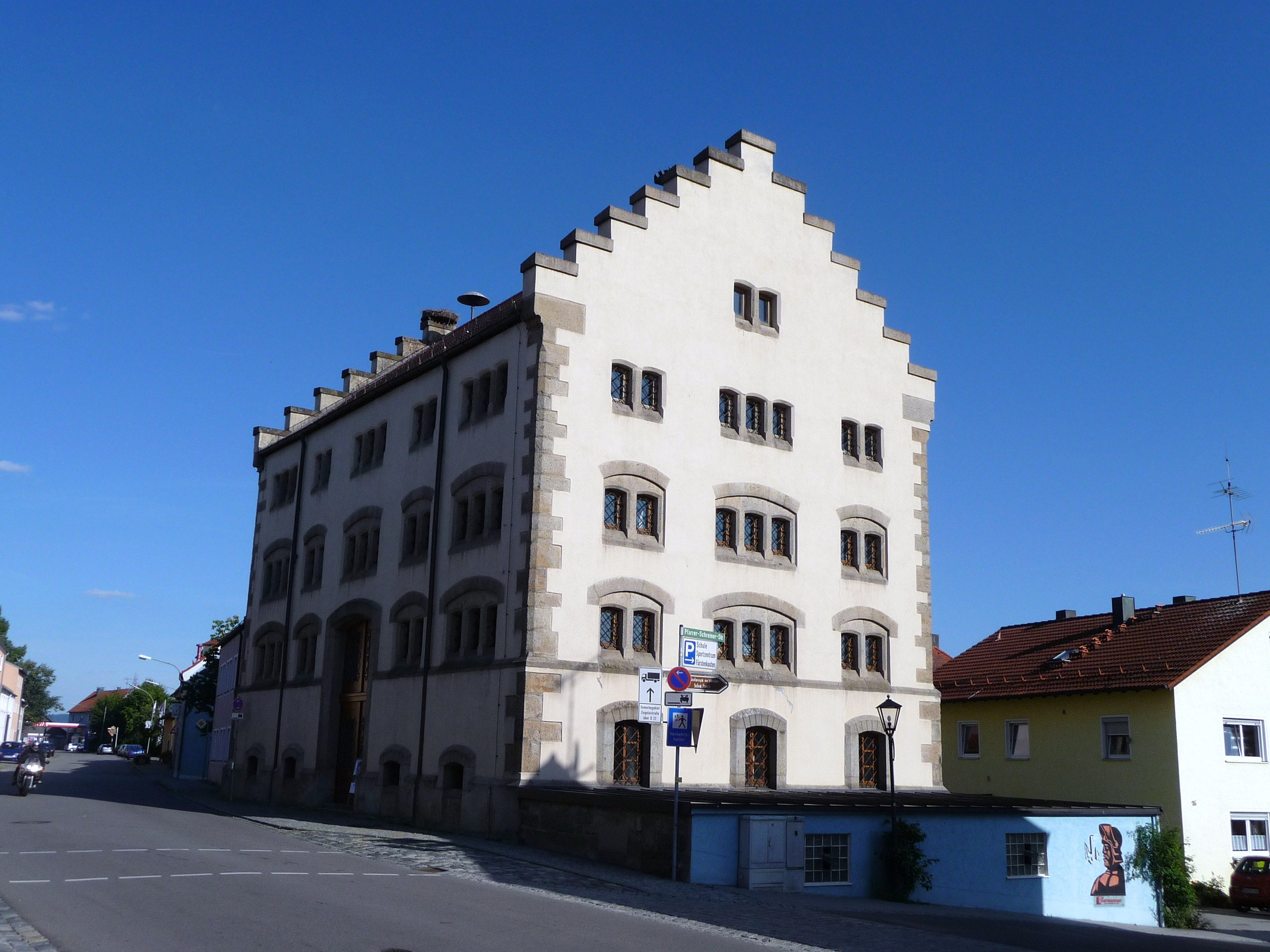 Der sogenannte Fürstenkasten in Rötz, ehemals kurfürstlicher Getreidekasten